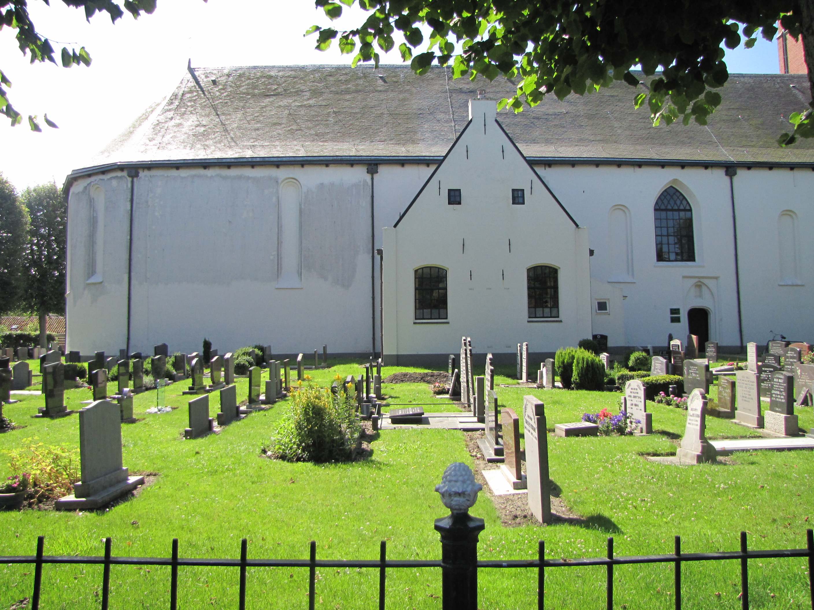 Sexbierum, Kirche